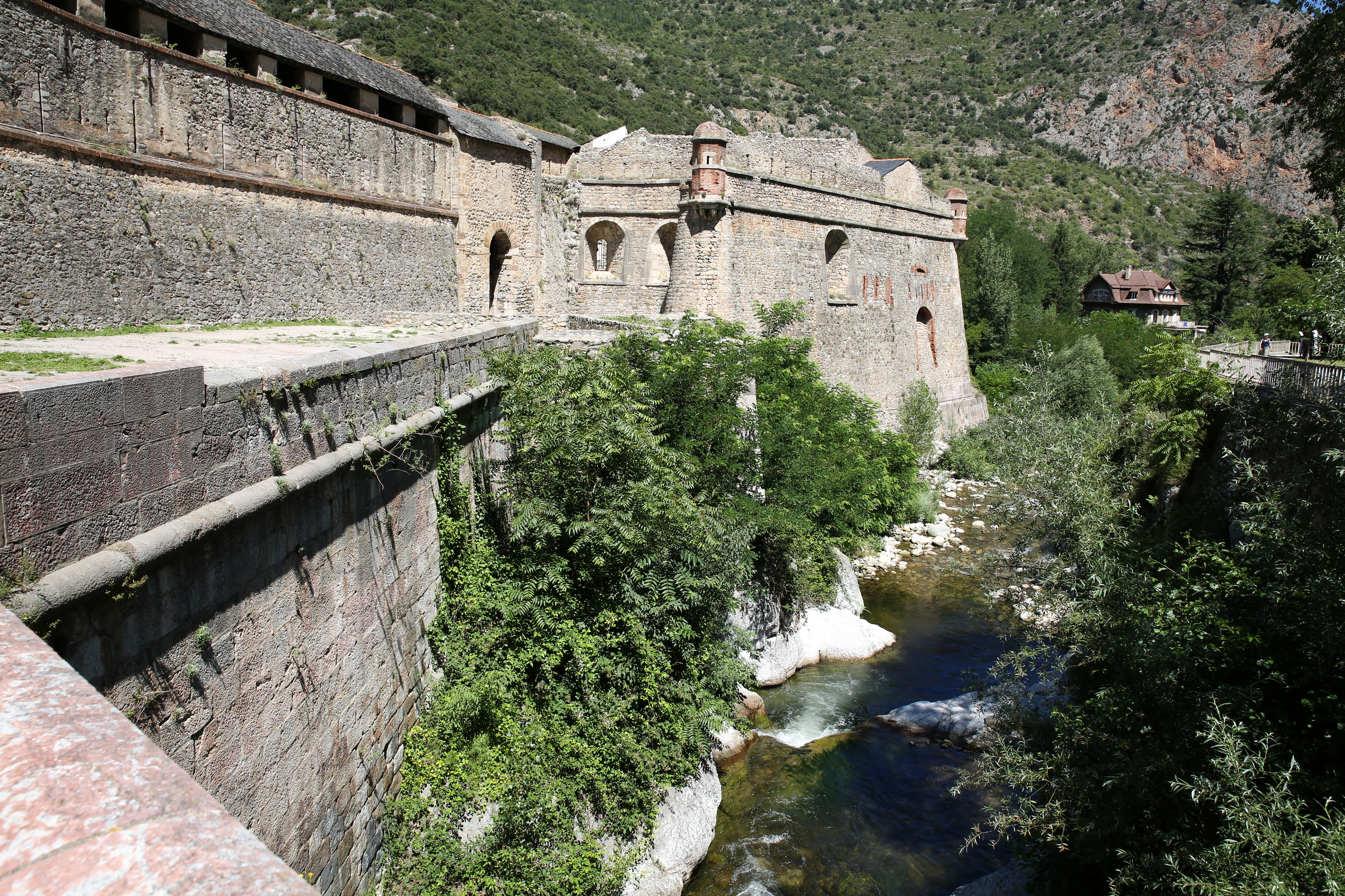 Fortification